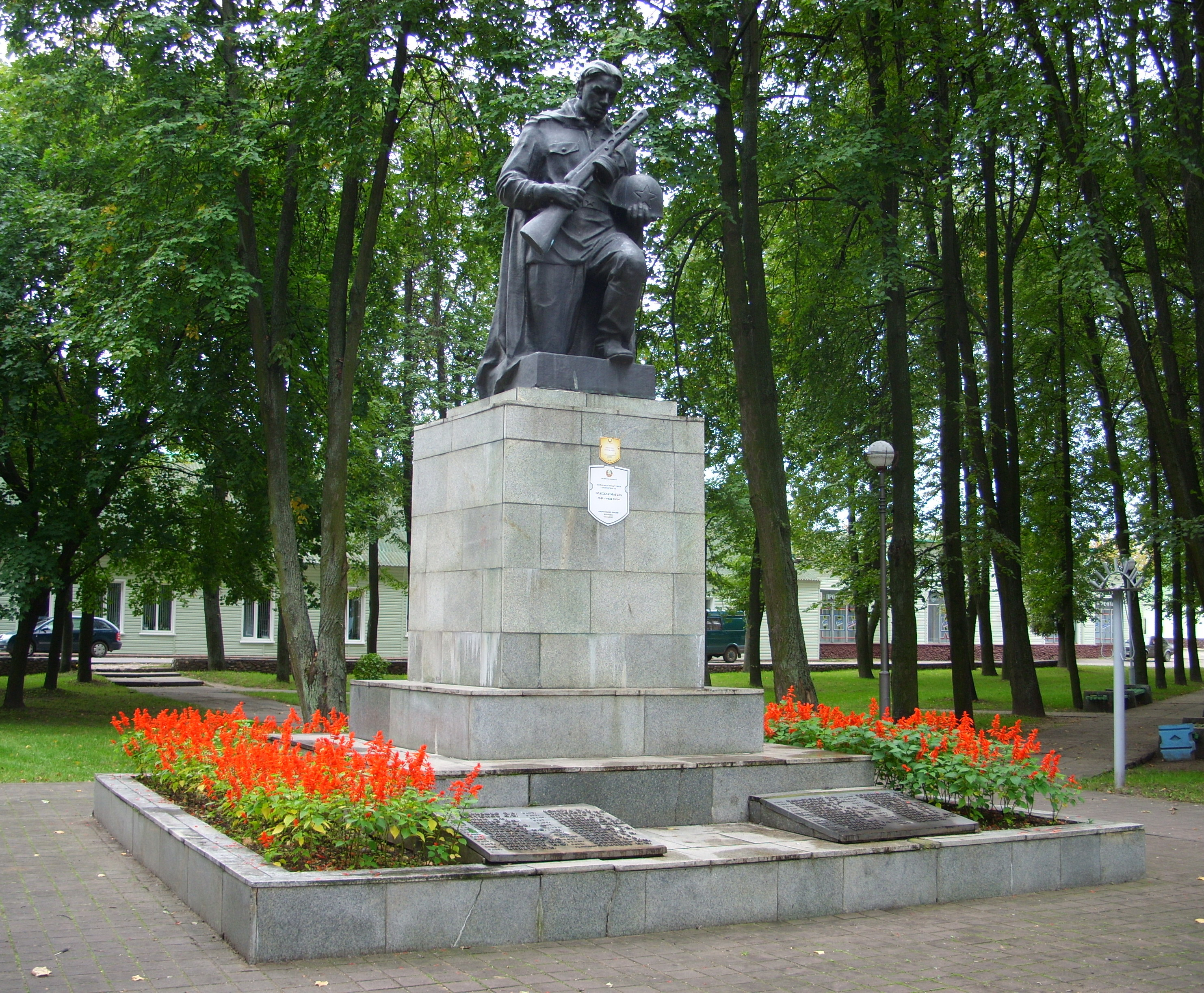 Беларуская (тарашкевіца): Братэрская магіла. г. Івацэвічы This is a photo of Belarusian heritage monument. Reference number: 113Д000283 ( WLM)